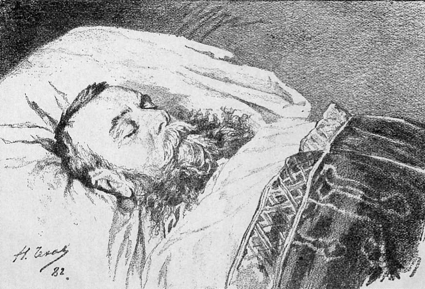 Генерал Михаил Дмитриевич Скобелев на смертном одре. Рисунок Николая Чехова. 1882.